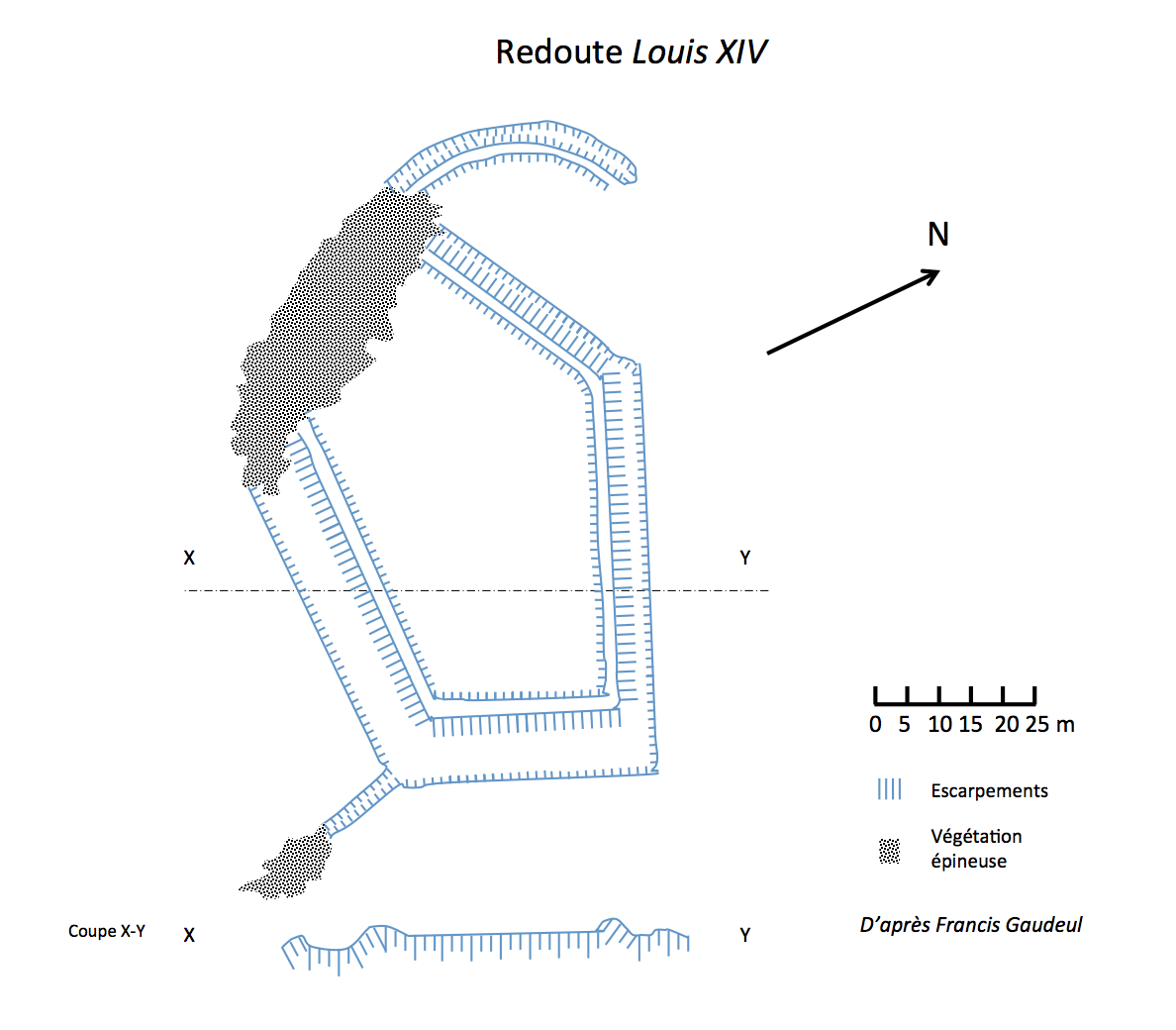 Urrugne - Redoute Louis XIV